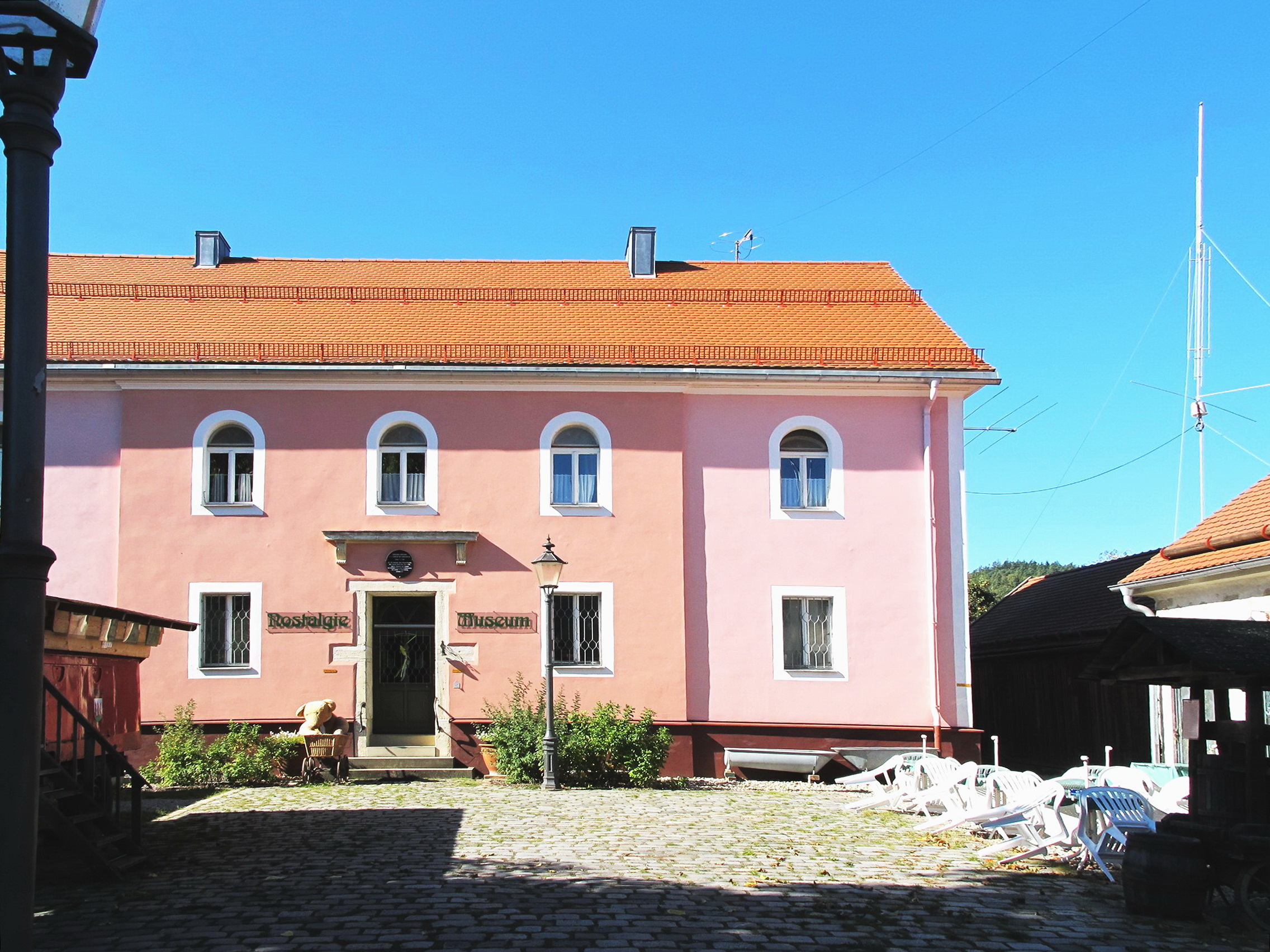 Wörth an der Donau. Hofdorf, Zur alten Donau 4. zweigeschossiger und traufständiger Satteldachbau mit rundbogigen Öffnungen, Rundbogenstil. Das Haus beherbergt seit 1997 das Nostalgiemuseum.